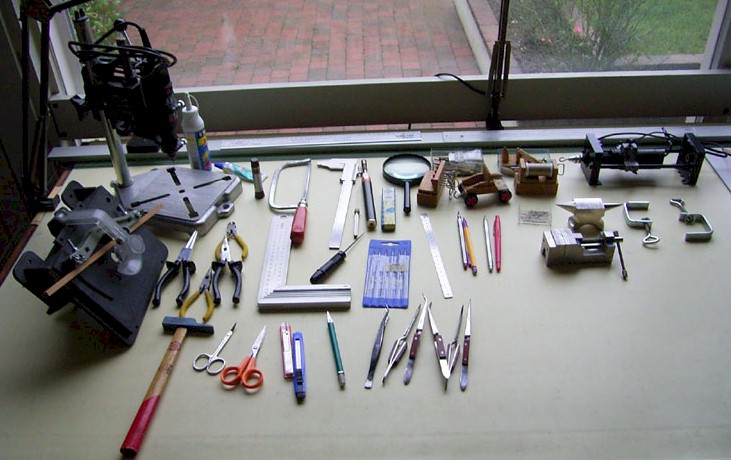 Description = Outillage nécessaire pour se lancer dans le modélisme d'arsenal Source = photo de l'auteur - avec son autorisation Author = Francis Jonet Permission = avec la permission de l'auteur - with author permission